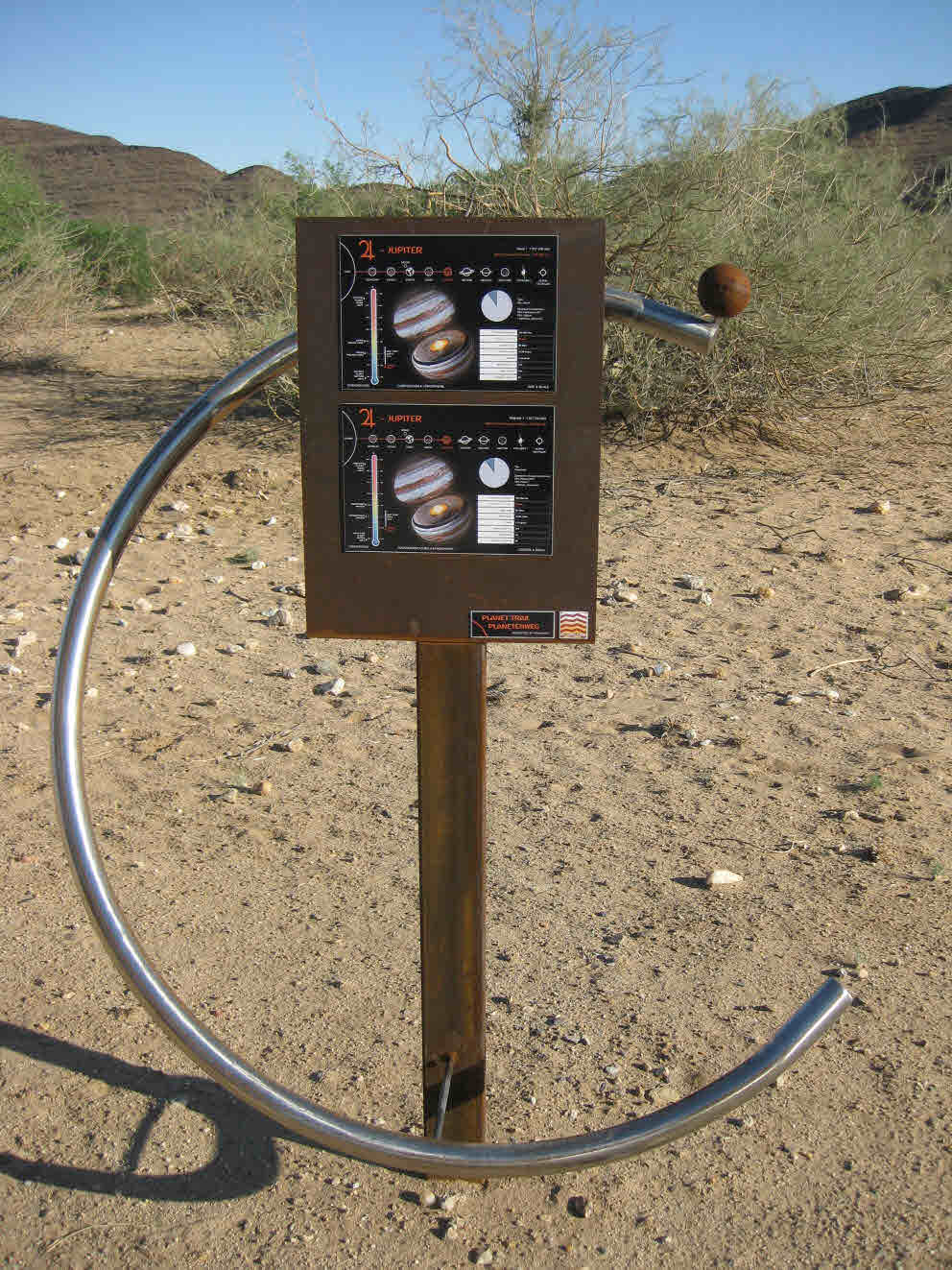 Jupitertafel auf dem Planetenweg der Rooisand Desert Ranch in Namibia